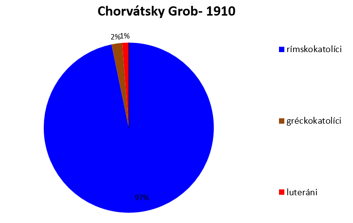 náboženské zloženie